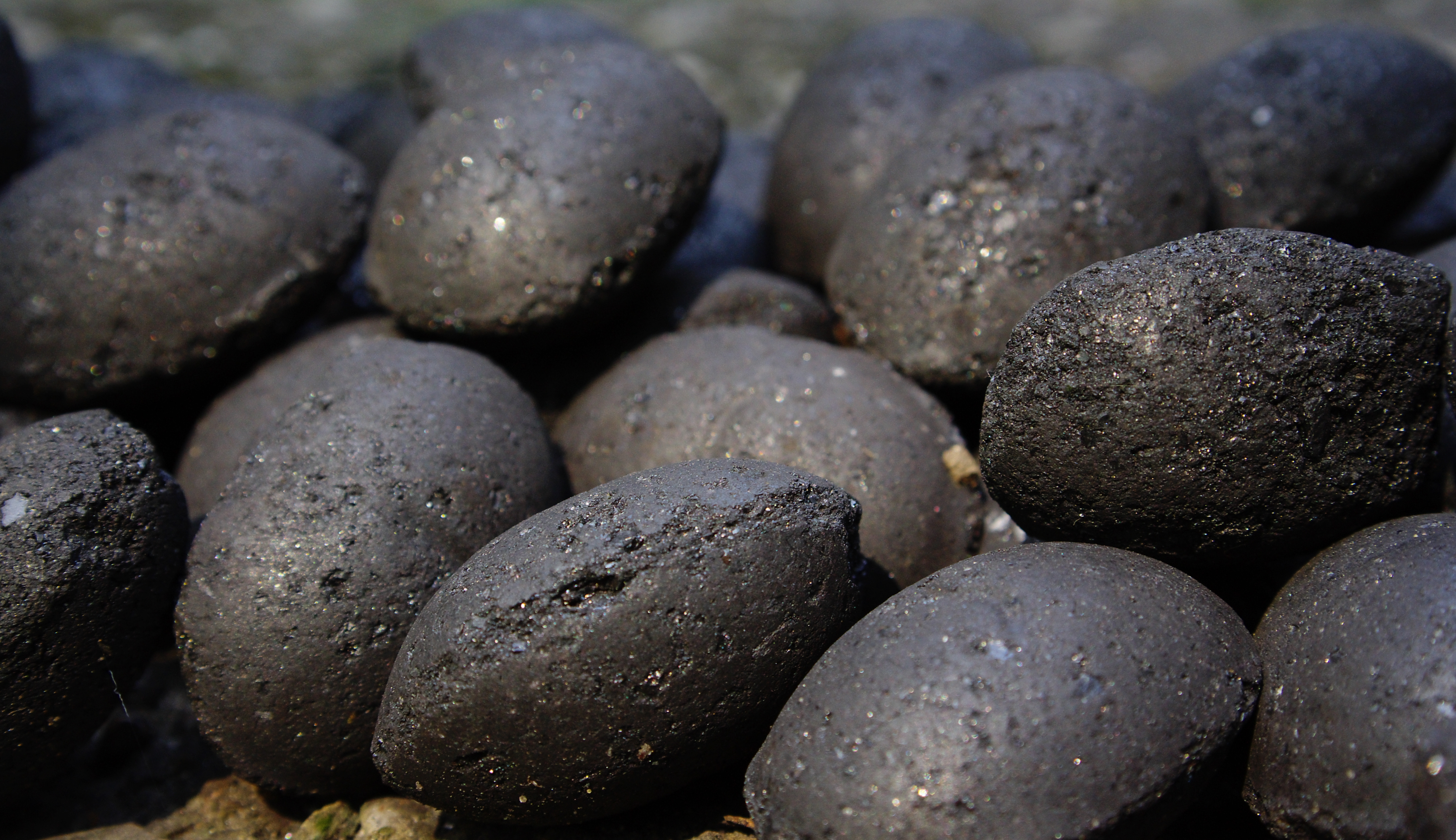 Eierkohlen